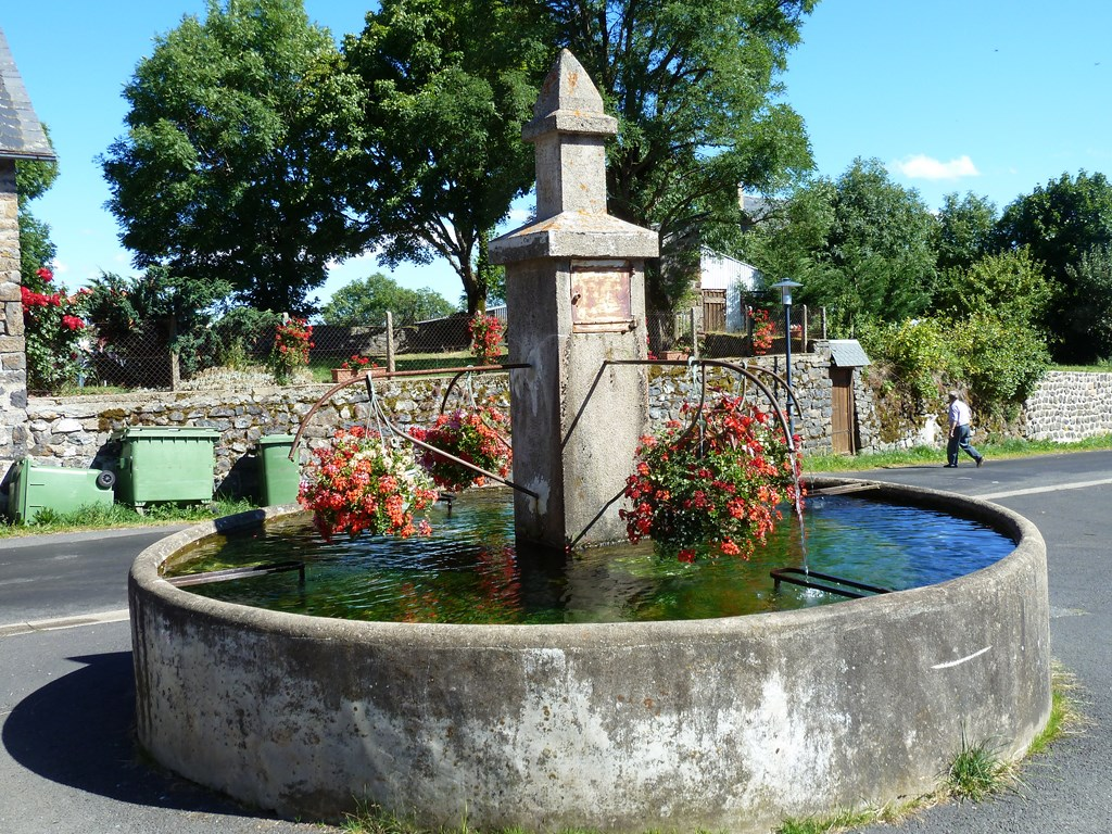 Village de Vèze, Cantal, France